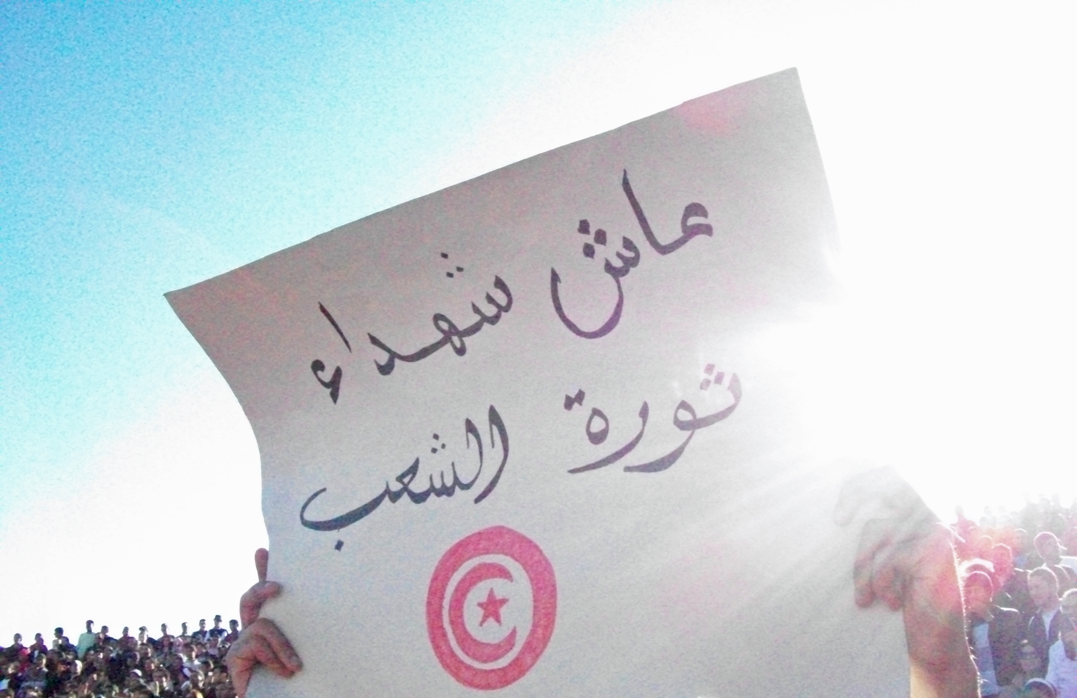 Full story: القصة L'article